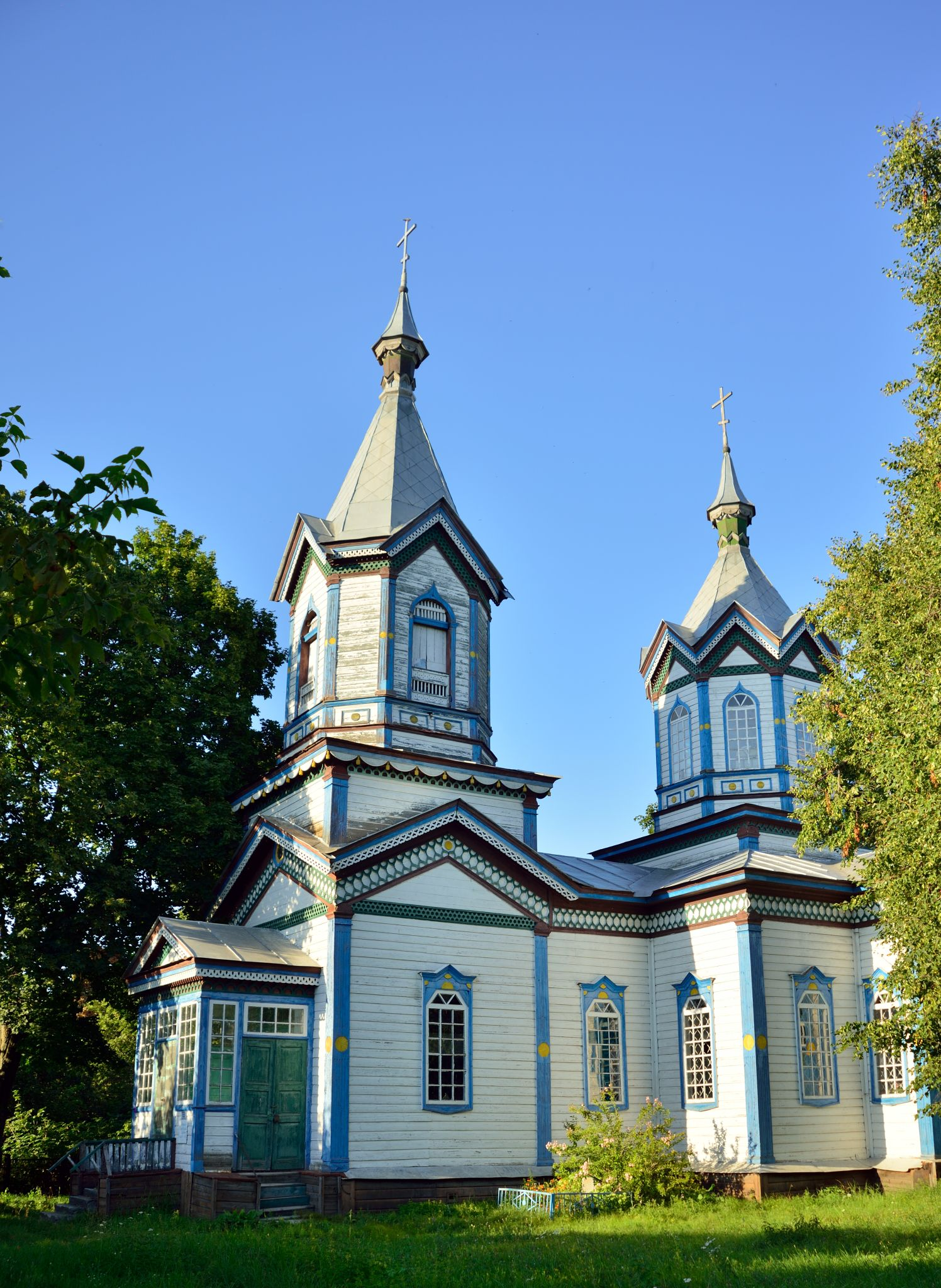 Церква Різдва Пресвятої Богородиці — дерев'яна церква в селі Харківці Гадяцького району Полтавської області.